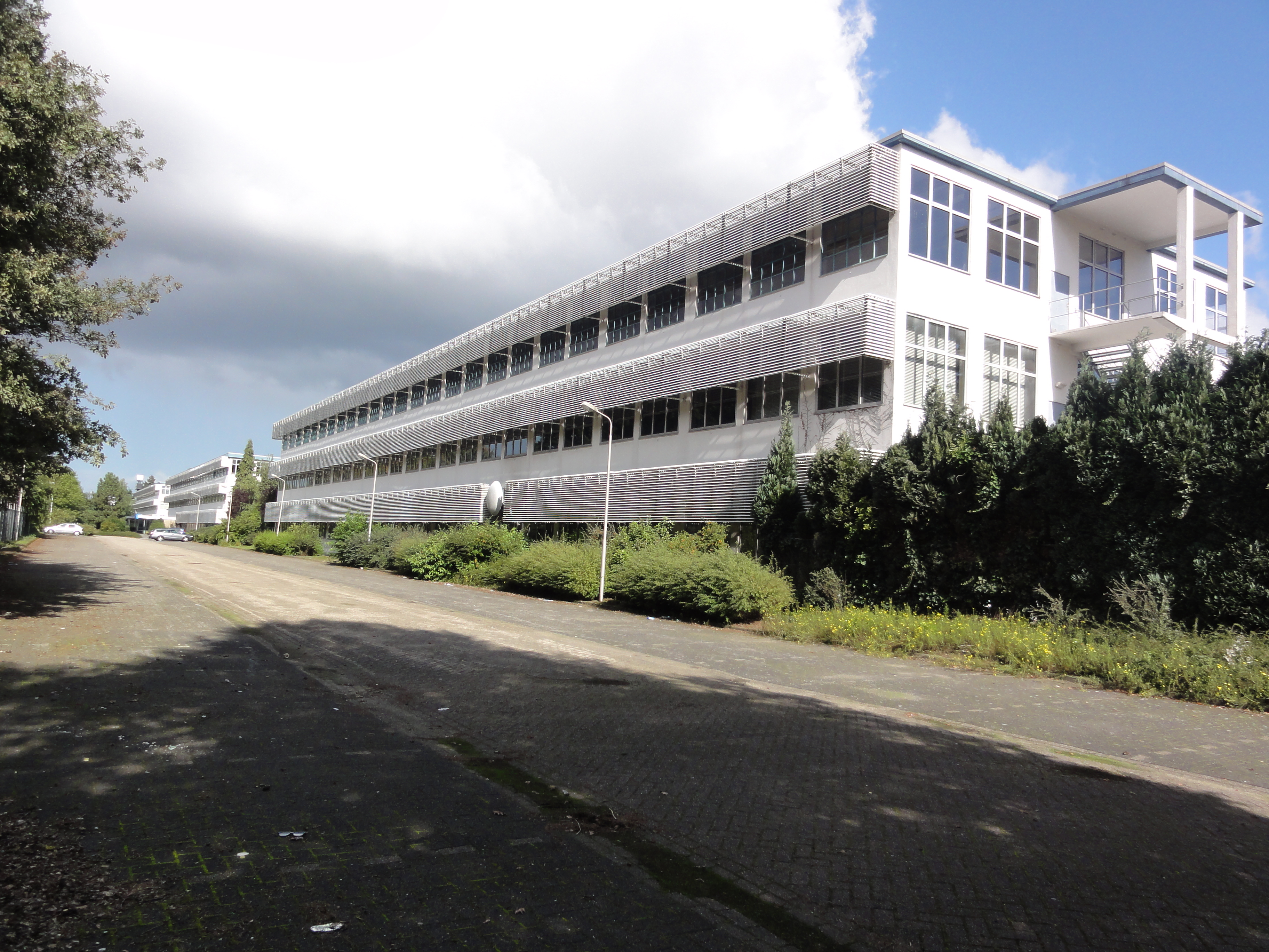 Best Rijksmonument 512318, 51239, 515262 BATA de drie gebouwen samen op één foto 04″ N, 5° 17′ 38.28″ E